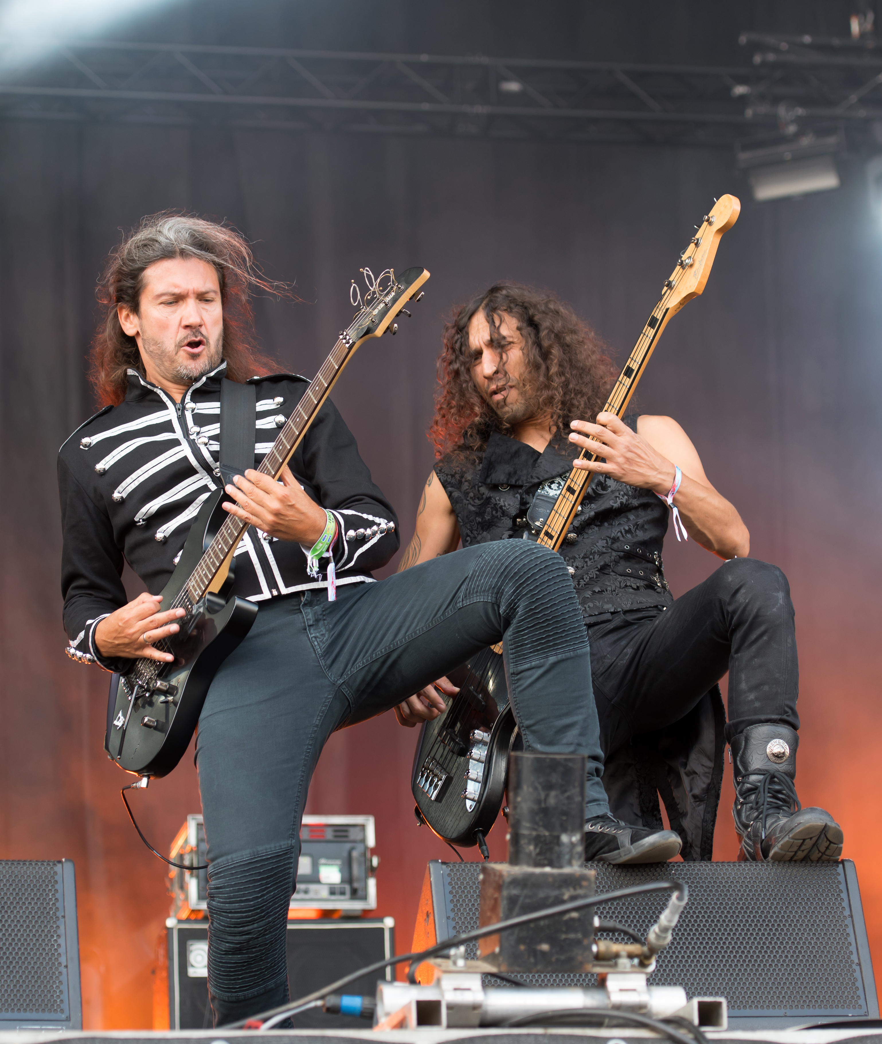 Almanac beim Werner Rennen 2018